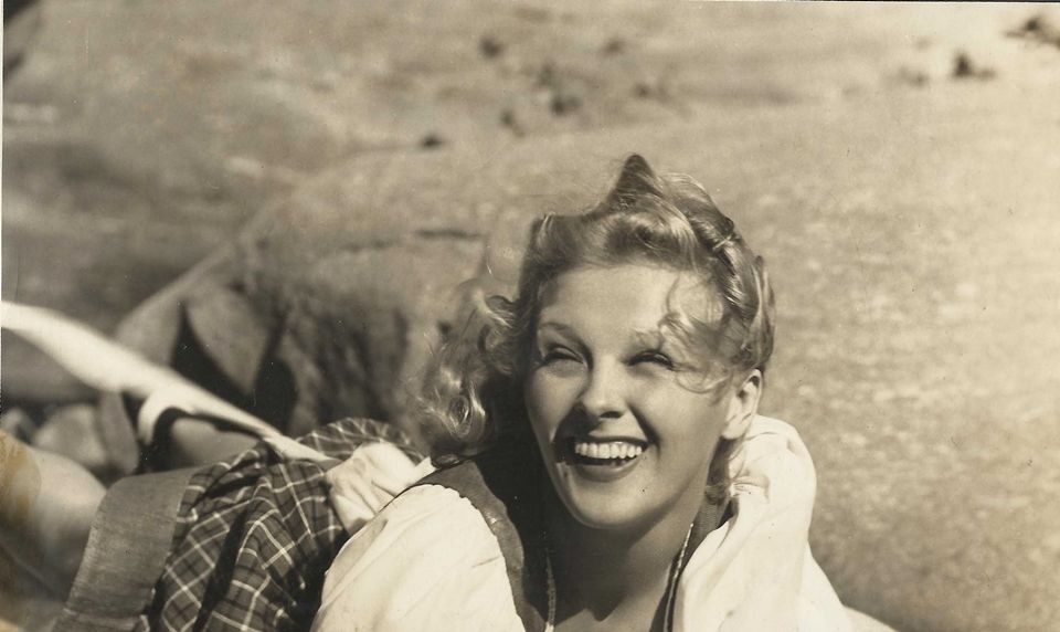 Hajmássy Ilona magyar színésznő, koloratúr szoprán énekesnő.